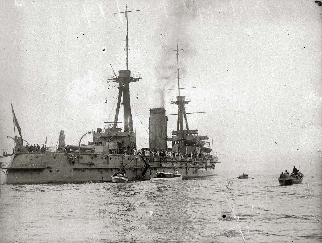 Título original: Buques y submarinos de la Armada en la bahía de Pasaia con destino a la guerra de África (1/7) Localización: Pasajes (Guipúzcoa) Descripción: El buque acorazado España de la Armada española, en la bahía de Pasajes de San Juan (Guipúzcoa), con destino a la guerra de África en 1922.